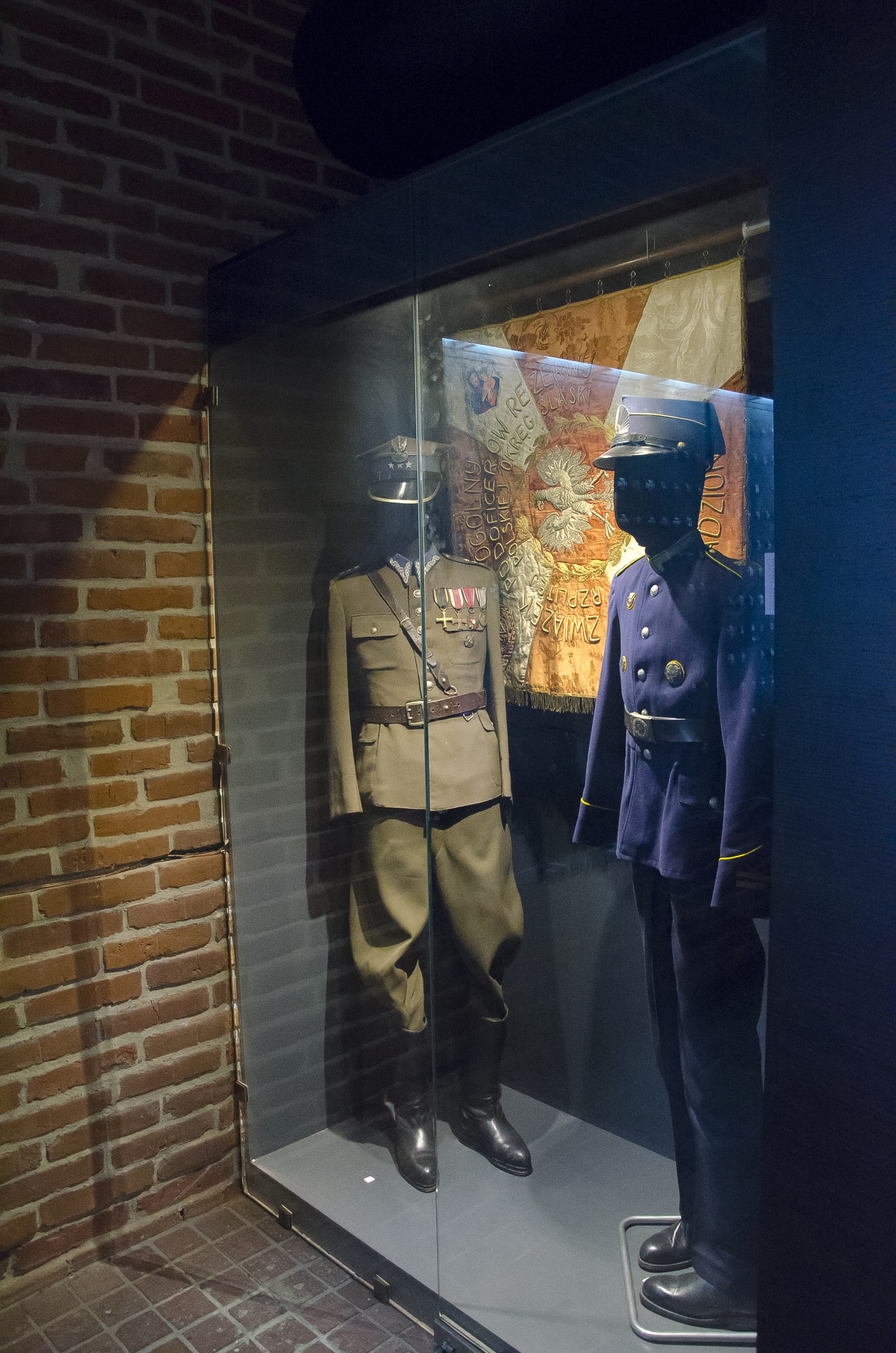 Warszawskie, Kraków, Poland